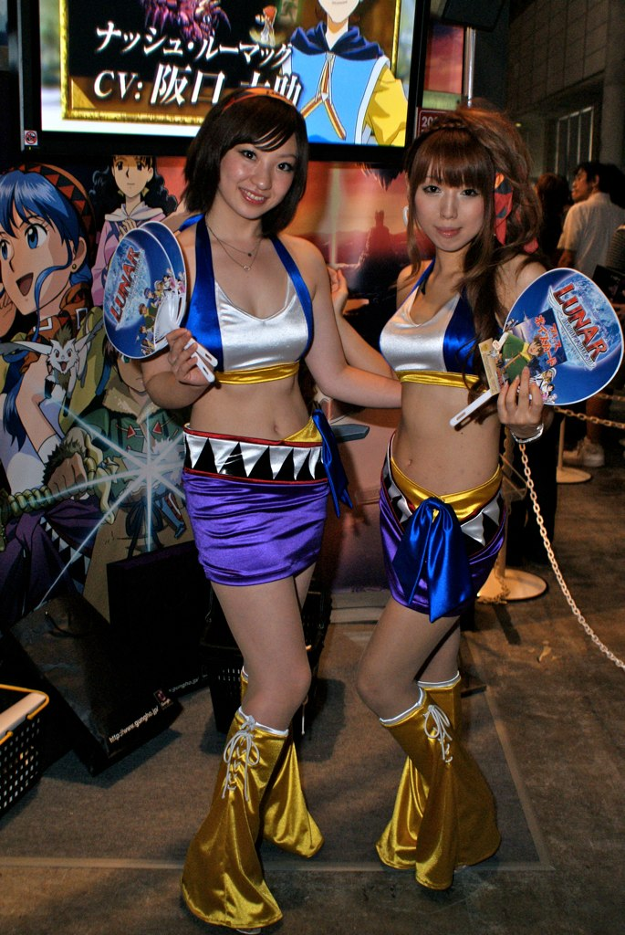 2009東京電玩展GungHo Works攤位，Lunar系列的宣傳模特兒。